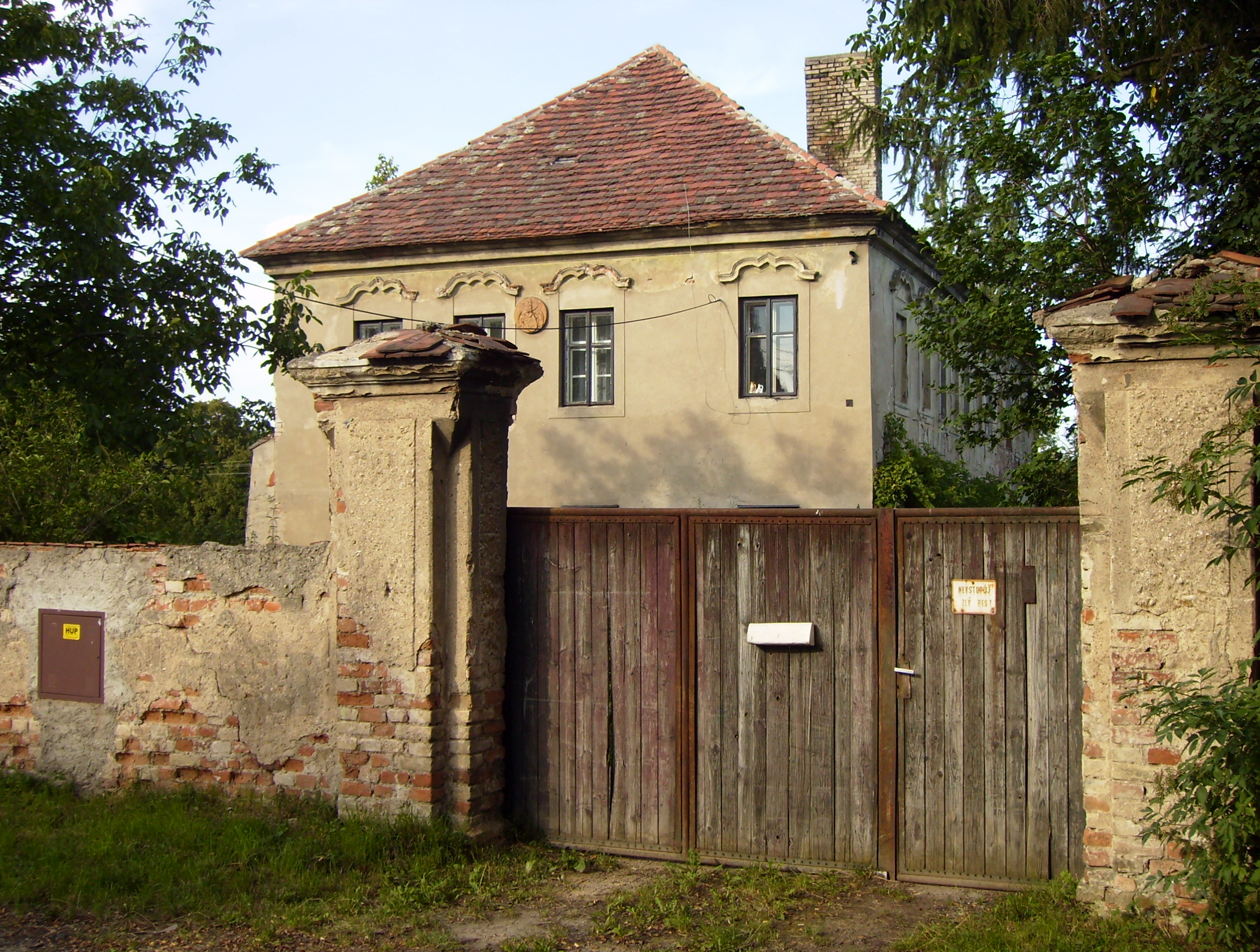 Zámeček v Kovanicích na Nymbursku.